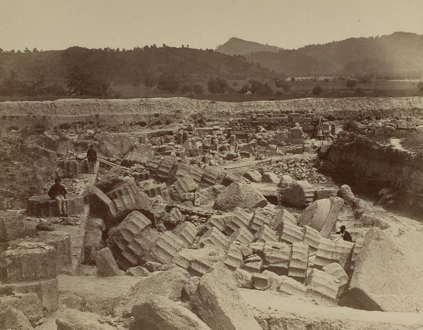 Ausgrabungsfeld von Westen, die Südkante des Tempels ist markirt; im Hintergrunde erscheinen die späteren Bauten und die innere Seite der Ostmauer.